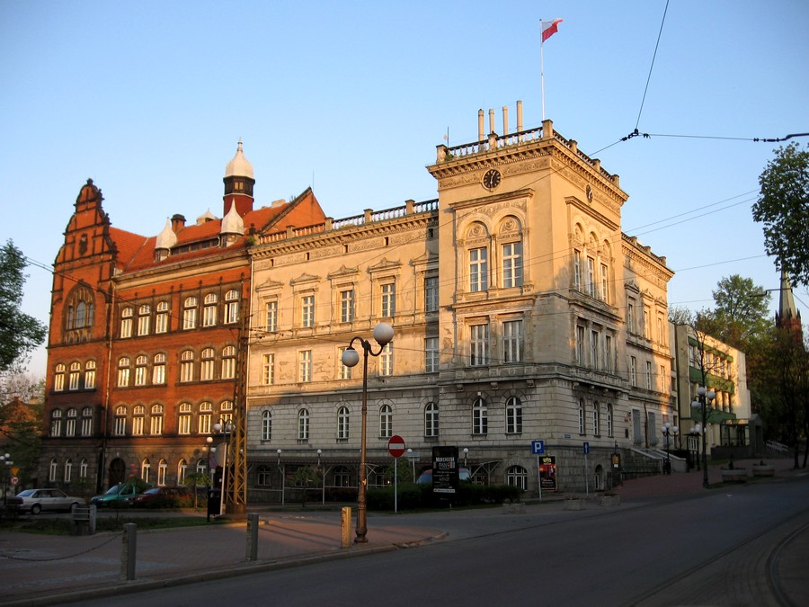 Urząd Miasta Mysłowice